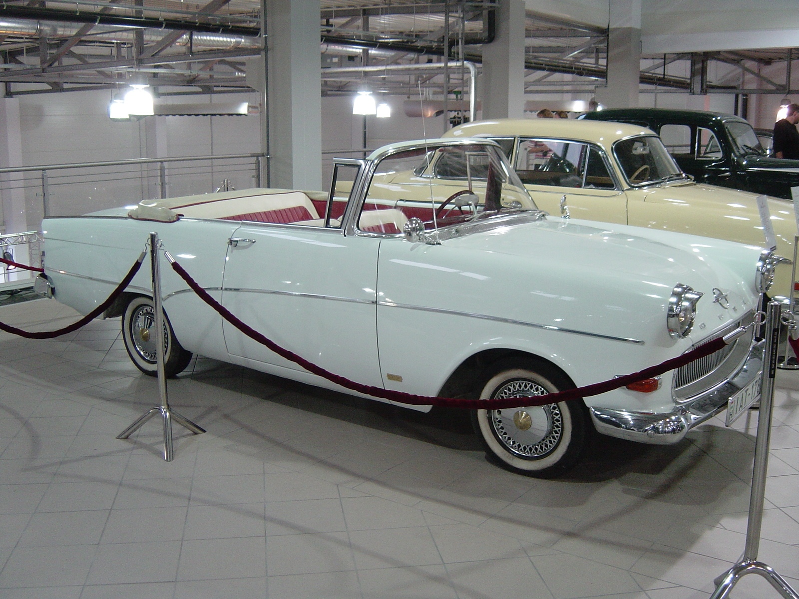 Opel Rekord P1 Cabrio